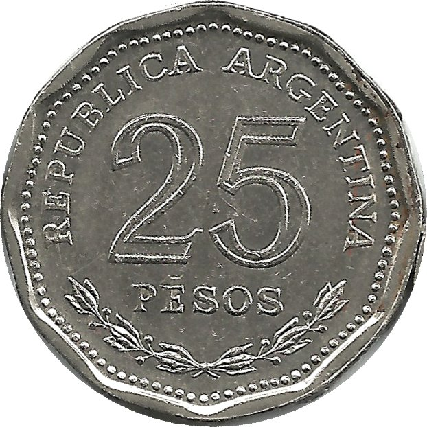 Adverso Moneda $25 1968 Centenario de la asunción presidencial Domingo Faustino Sarmiento 26mm Acero revestido en Níquel